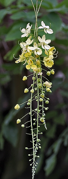 Amaltas - Indian Laburnum Cassia fistula in Kolkata, West Bengal, India.